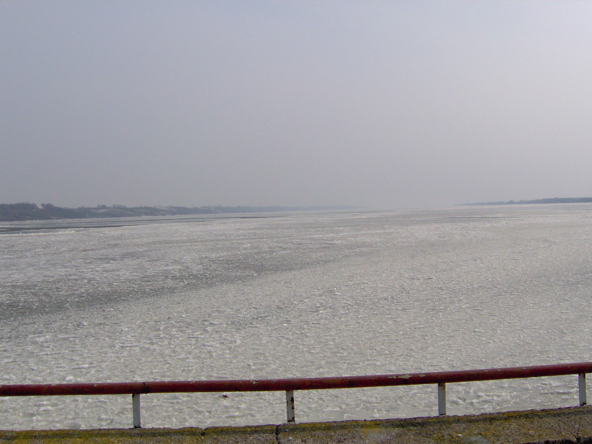 Zapora wodna na Wiśle i okolice (2007 r.)